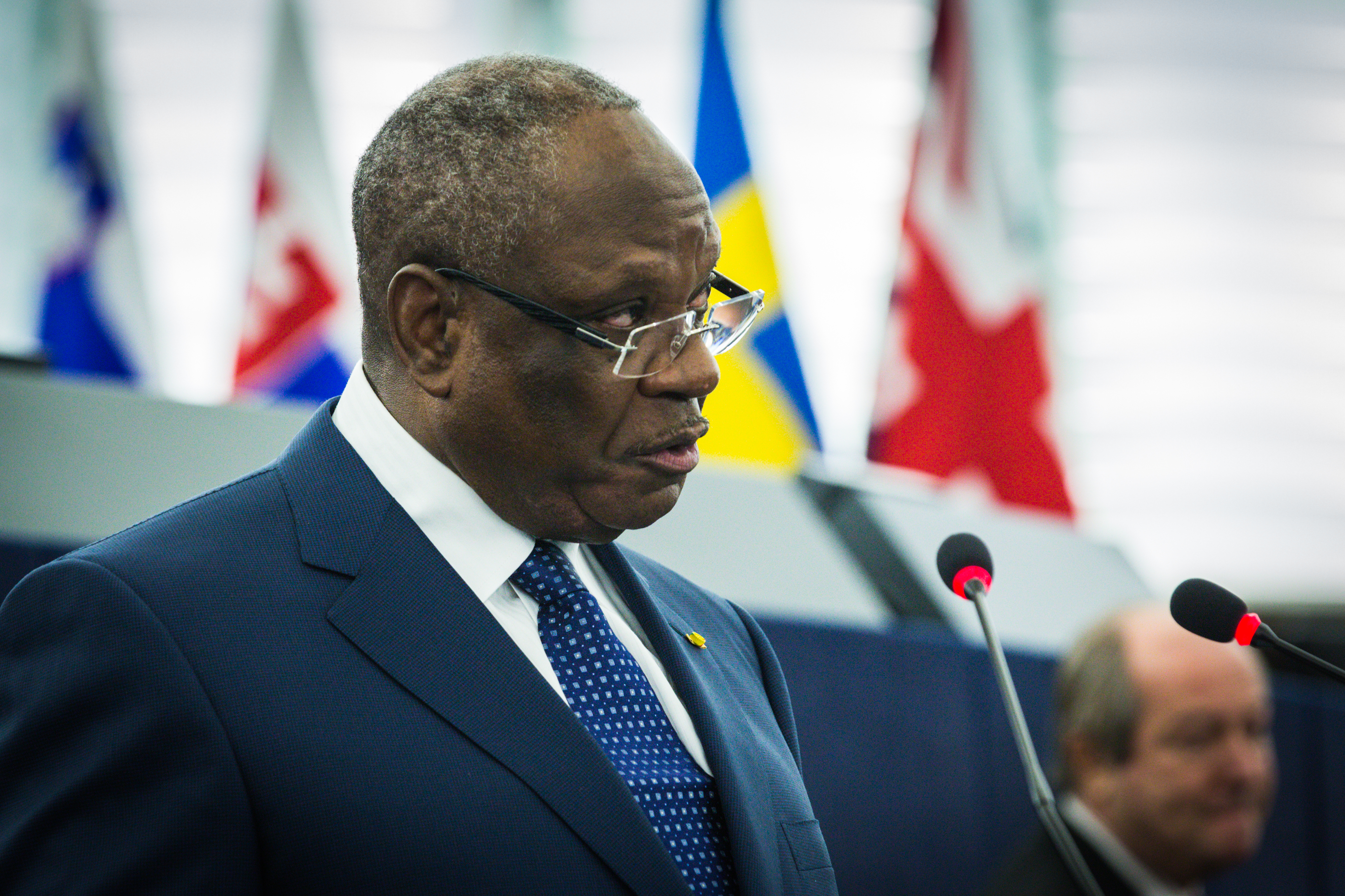 Le président de la république malienne, Ibrahim Boubacar Keïta au Parlement européen de Strasbourg le 10 décembre 2013.